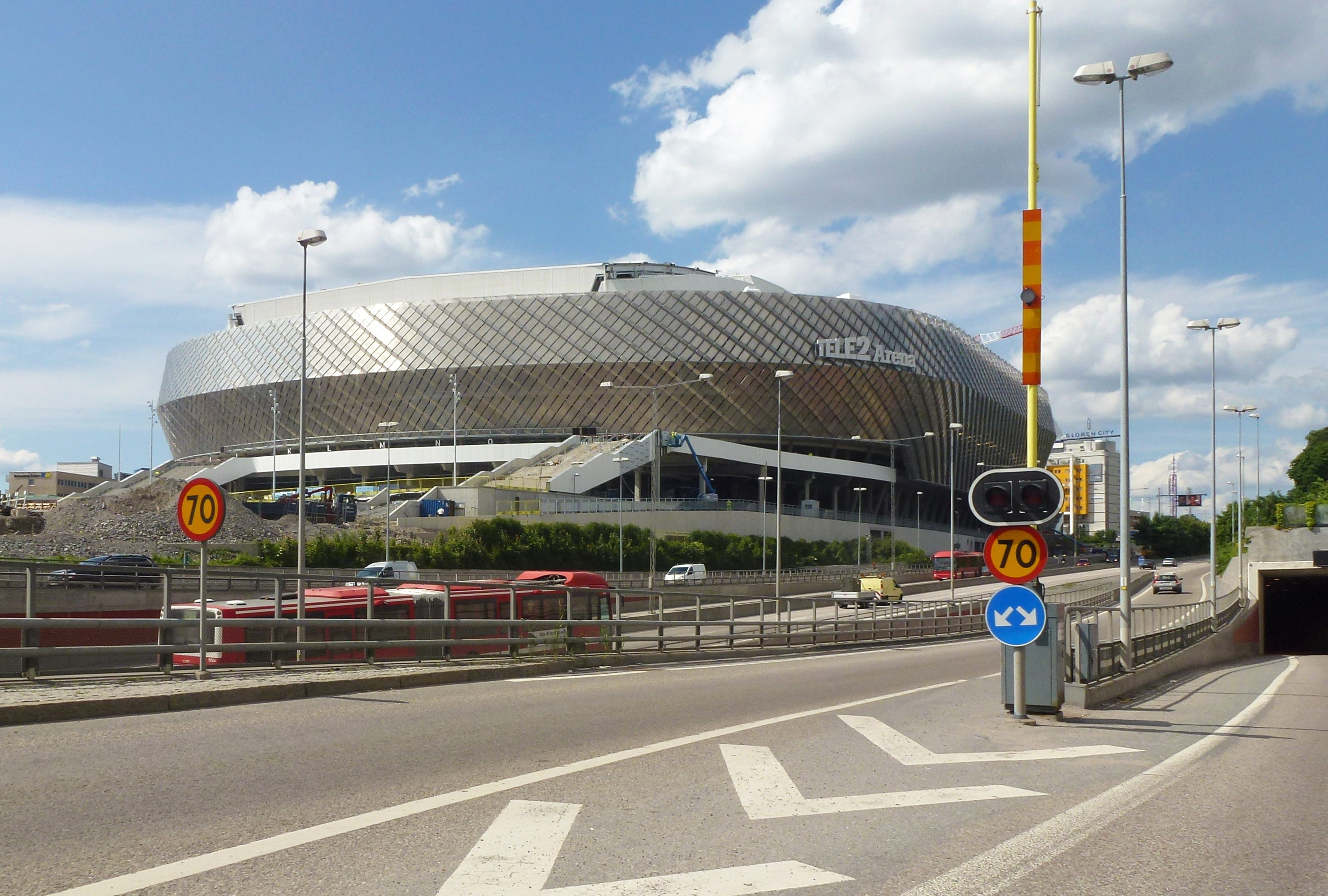 Tele2 Arena den 25 juni 2013